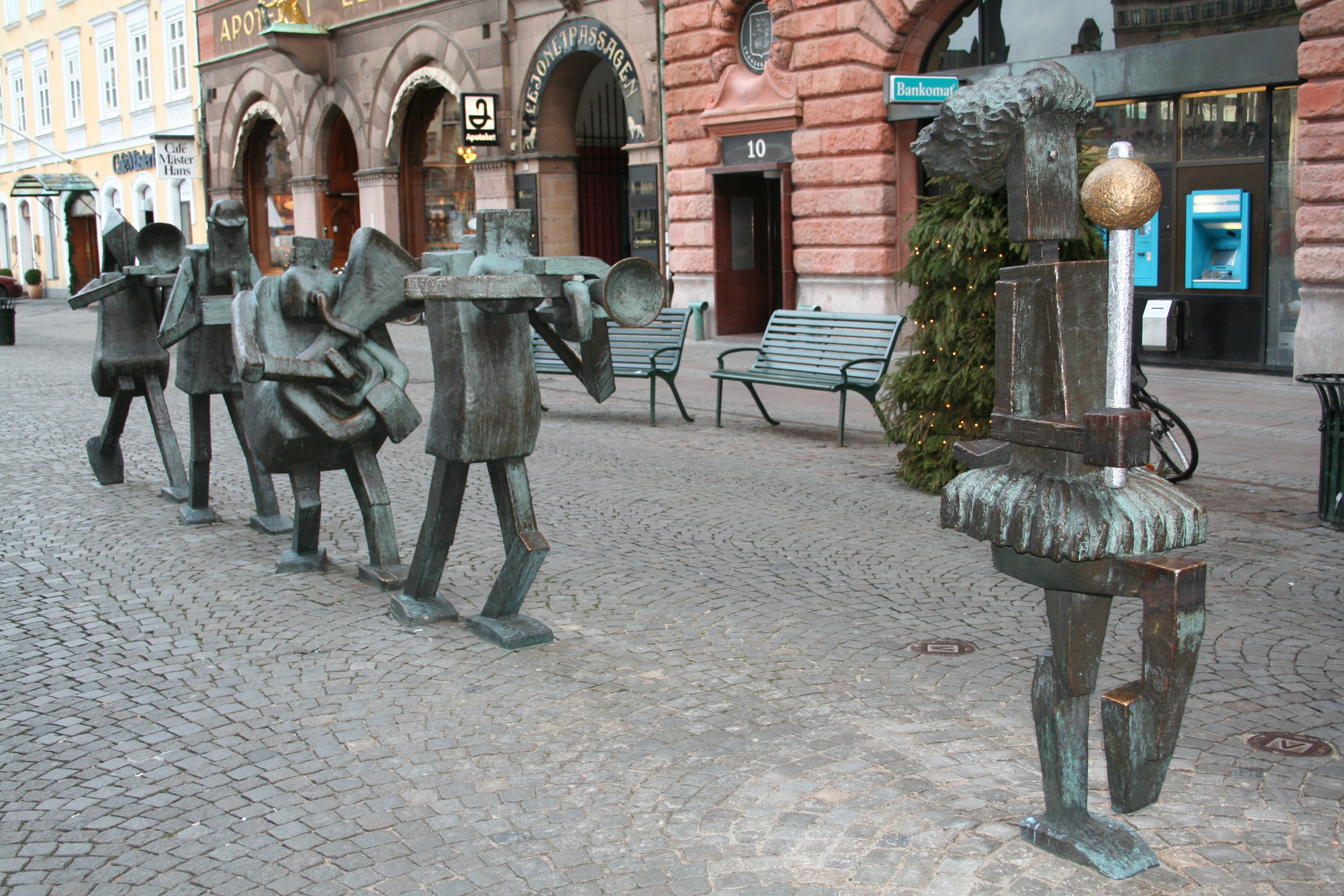 Statues de musiciens dans une rue commerçante de Malmö